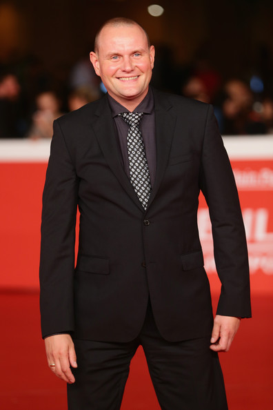 Devid Striesow bei der Welturaufführung von "Wir sind jung. Wir sind stark." in Rom